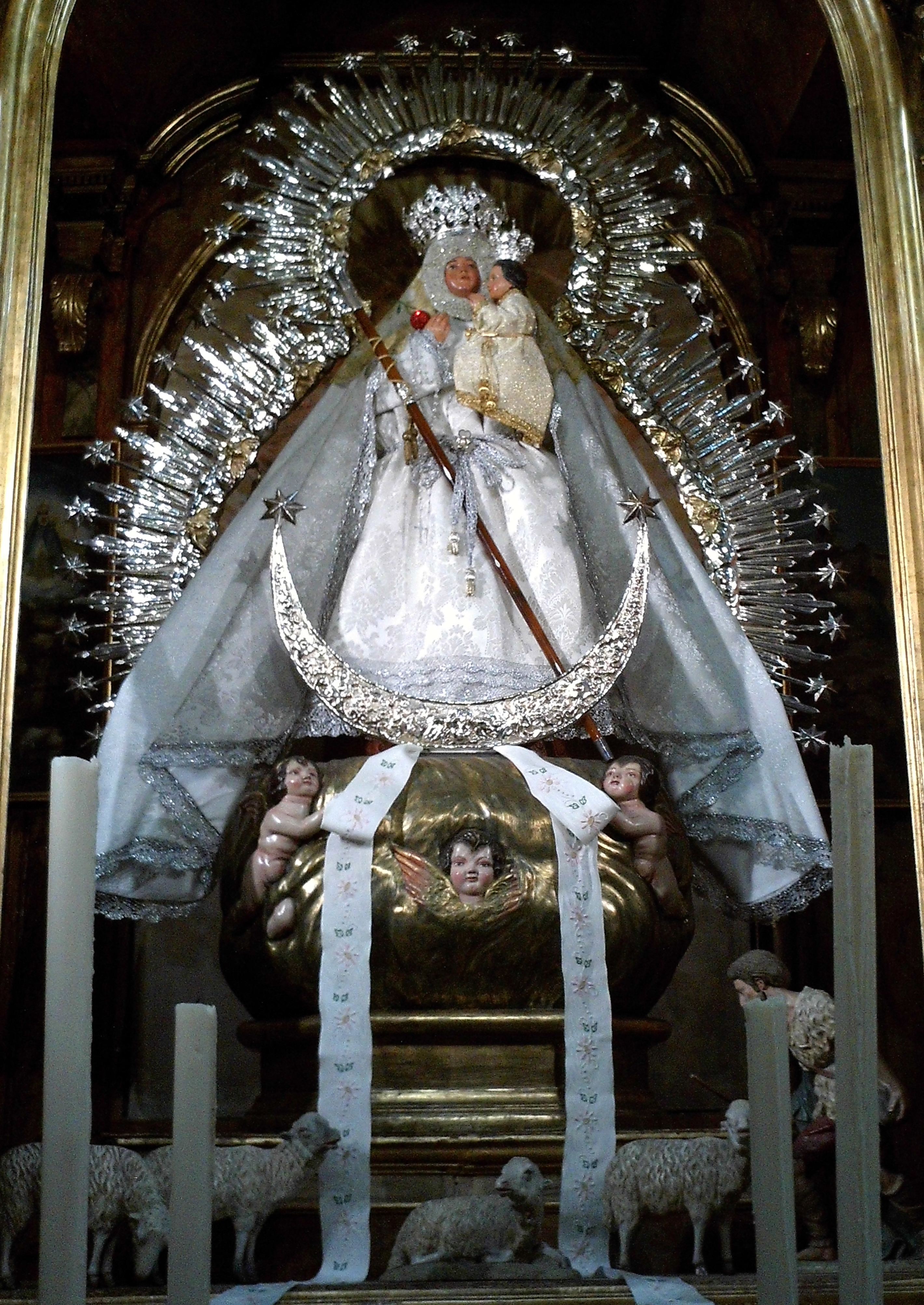 Virgen de la Cabeza. Fernando Cruz, 1931. Iglesia de San Juan de la Palma. Sevilla, Andalucía, España.